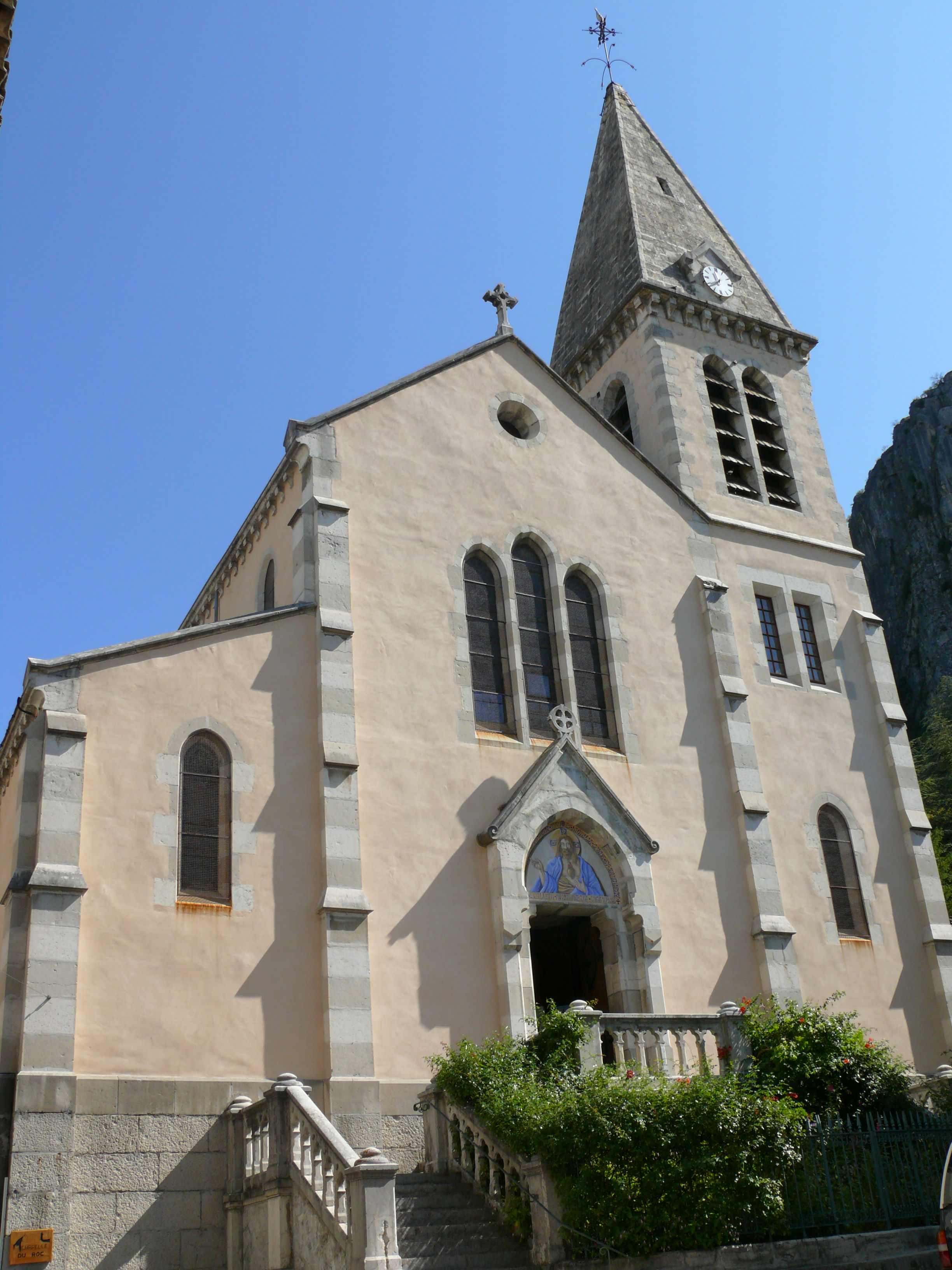 Église du Sacré-Cœur de Castellane